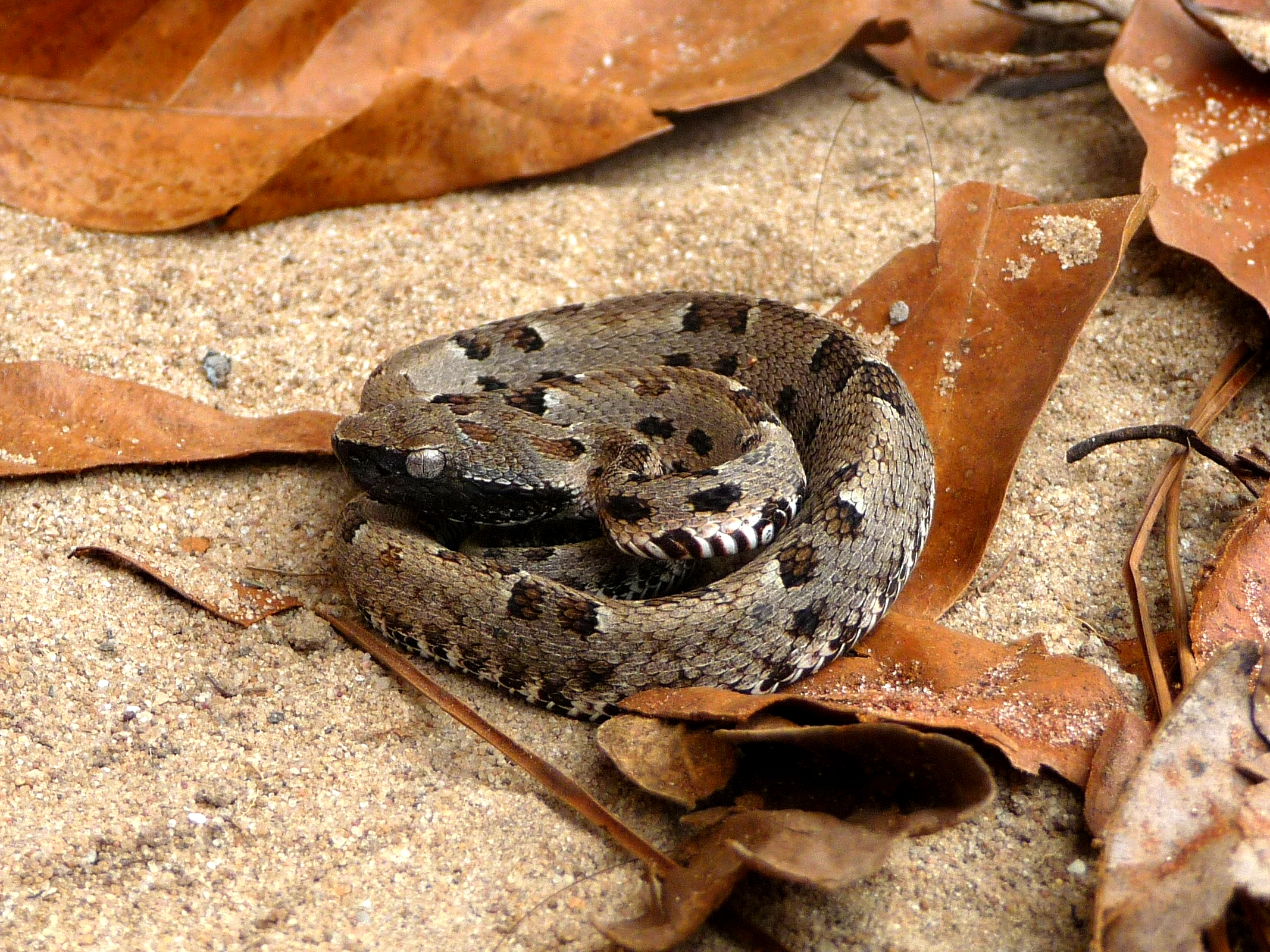 Animal fotografado em saída a campo para a Estação Ecológica de Águas de Santa Bárbara